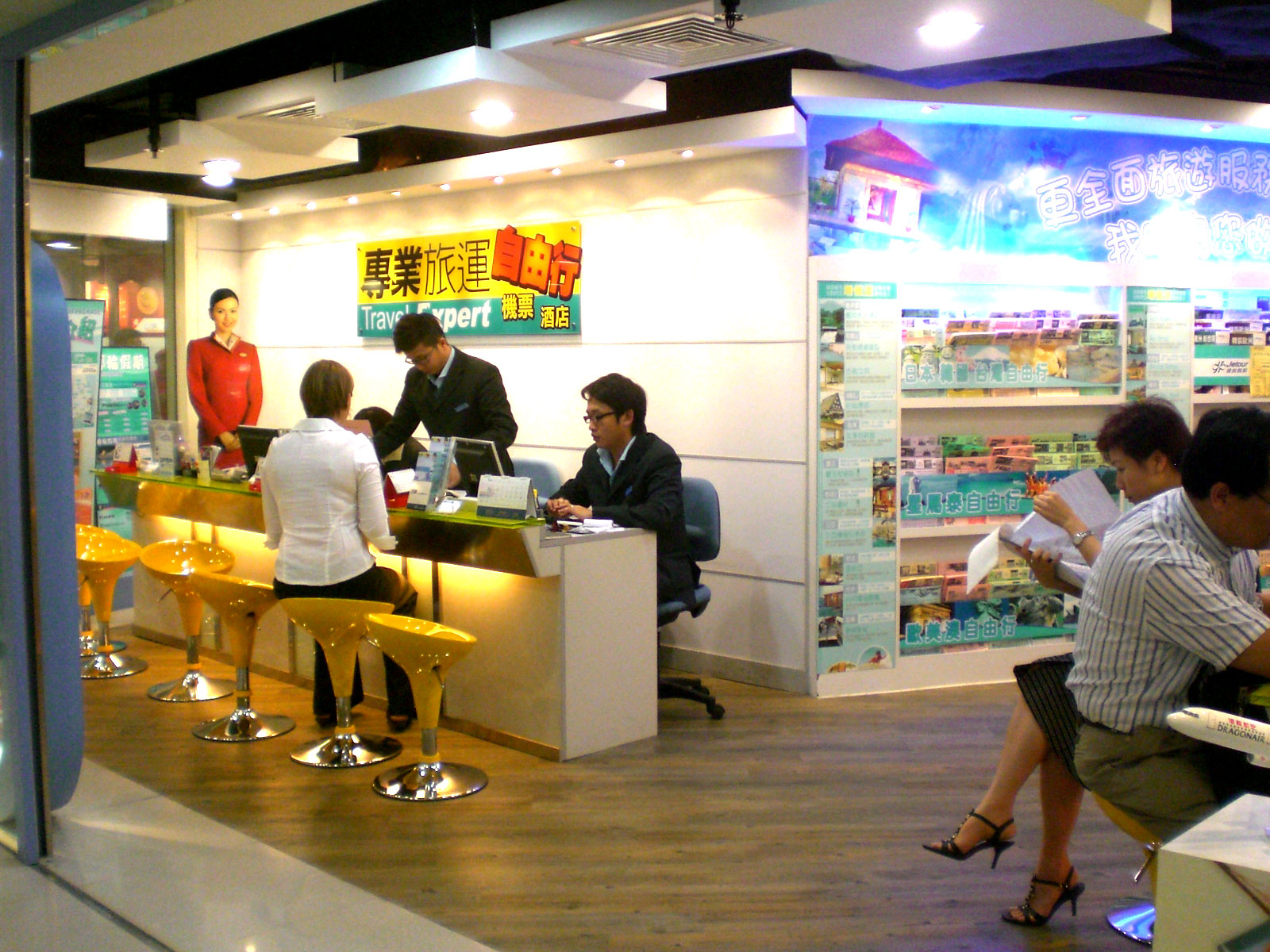 專業旅運 @ 維德廣場